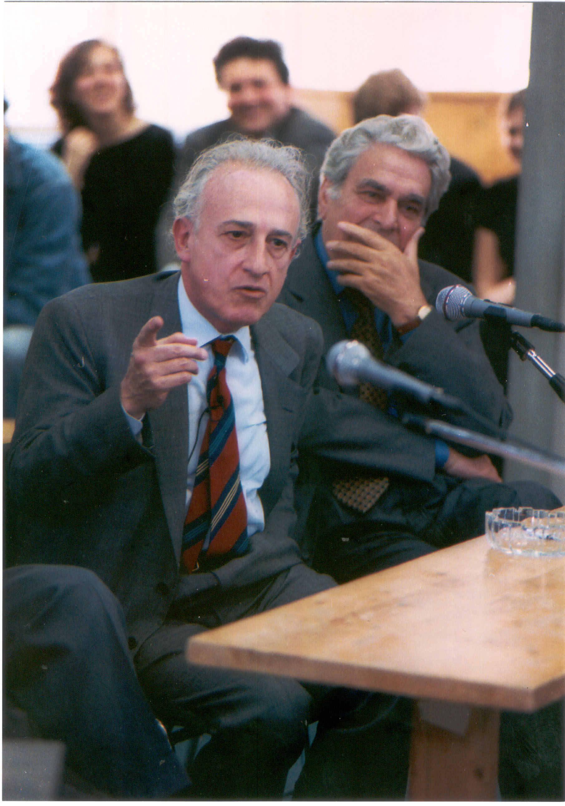 Piero Farulli e Maurizio Pollini